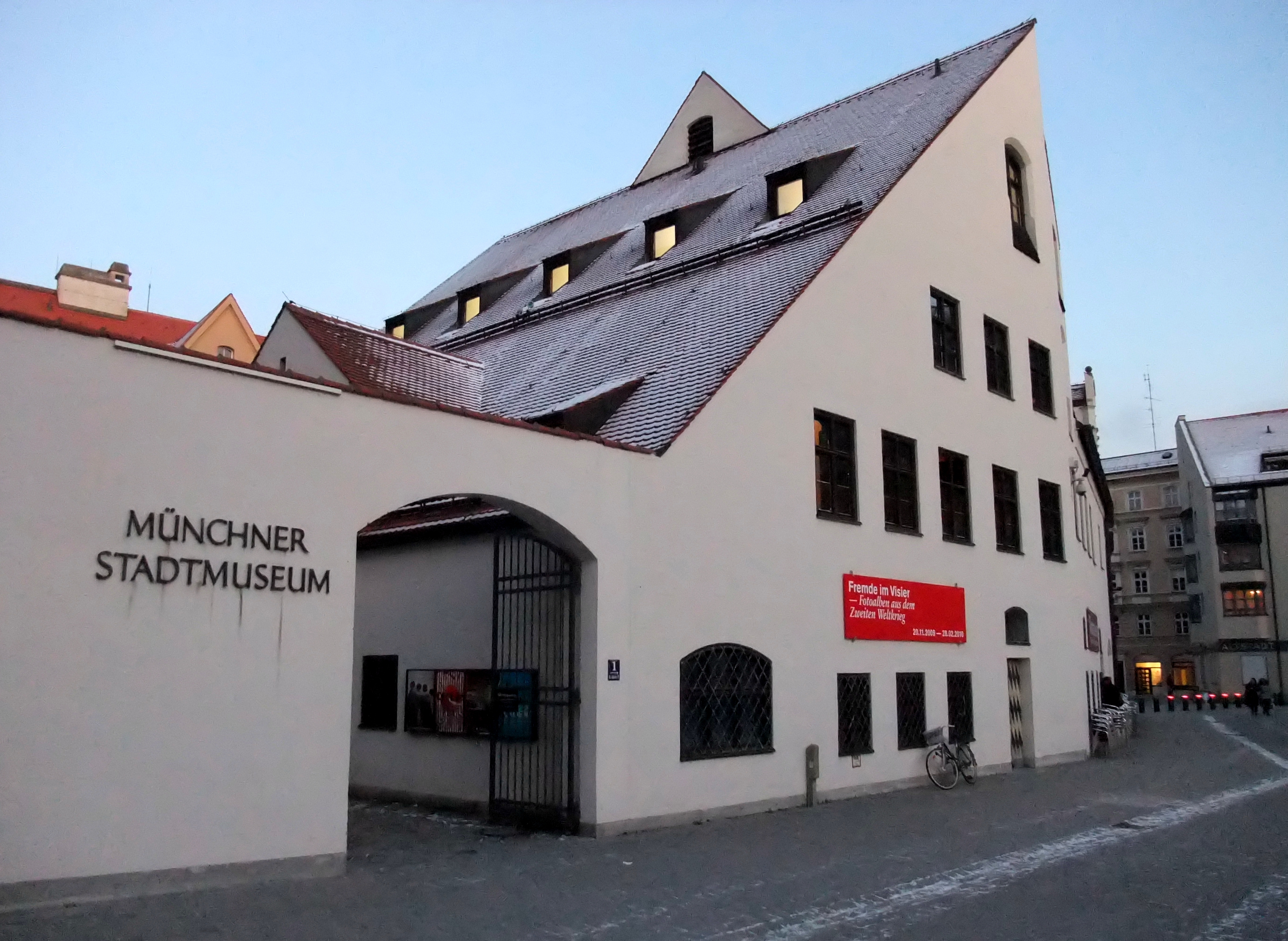 Deutschland, Bayern, München, Münchner Stadtmuseum am